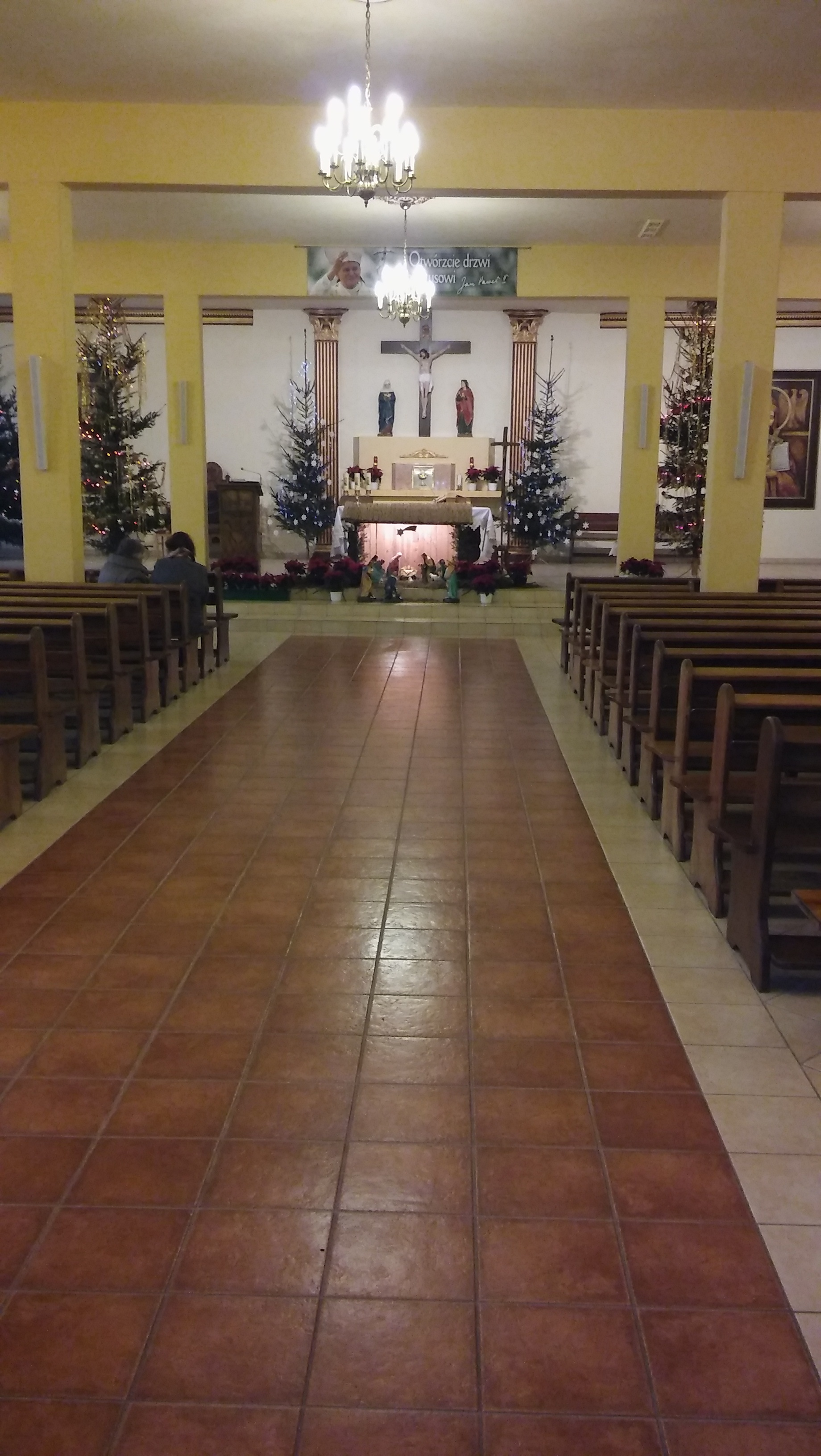 Kościół św. Wojciecha w Braniewie wewnątrz